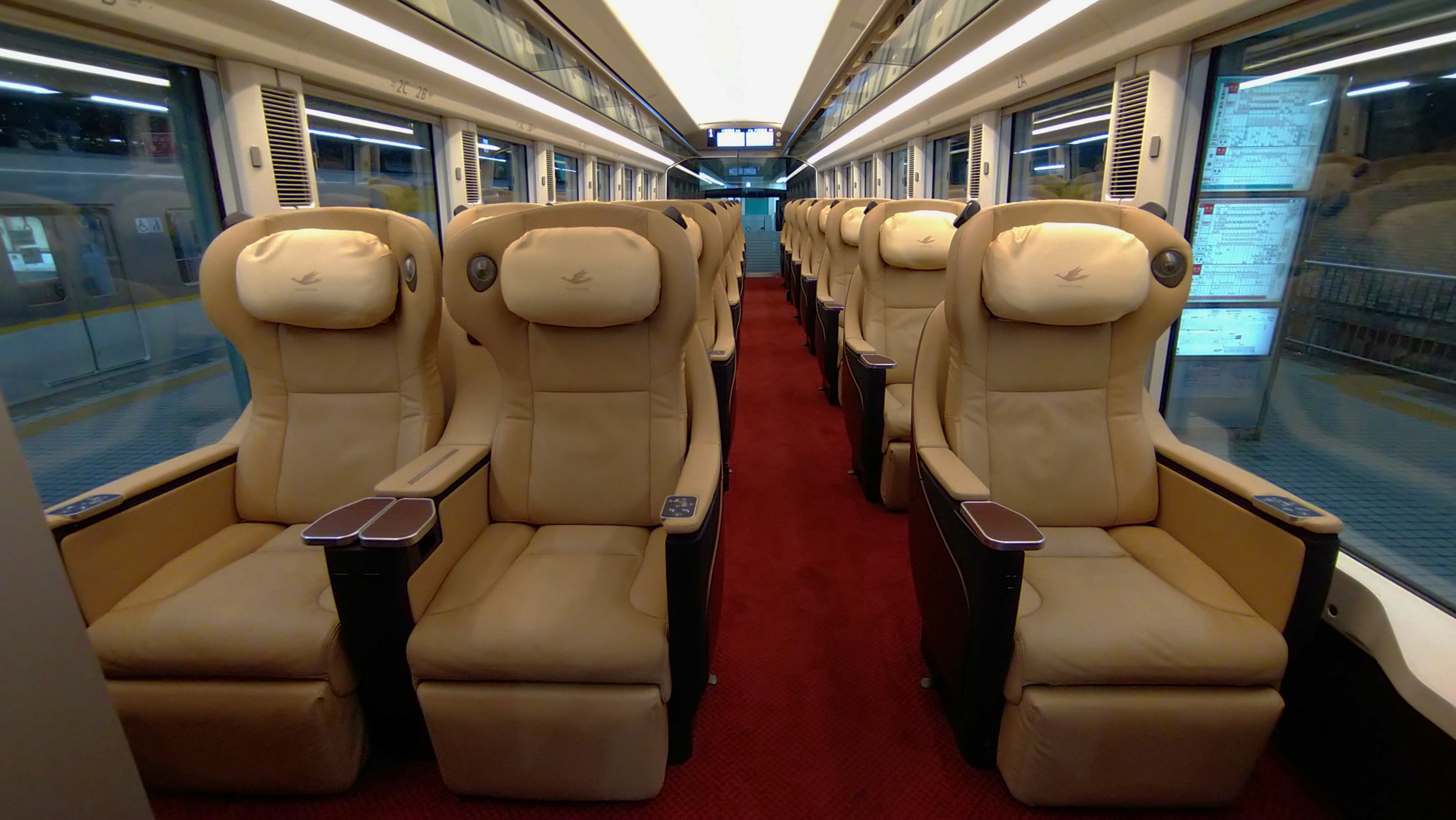 プレミアム席は1×2列シート。